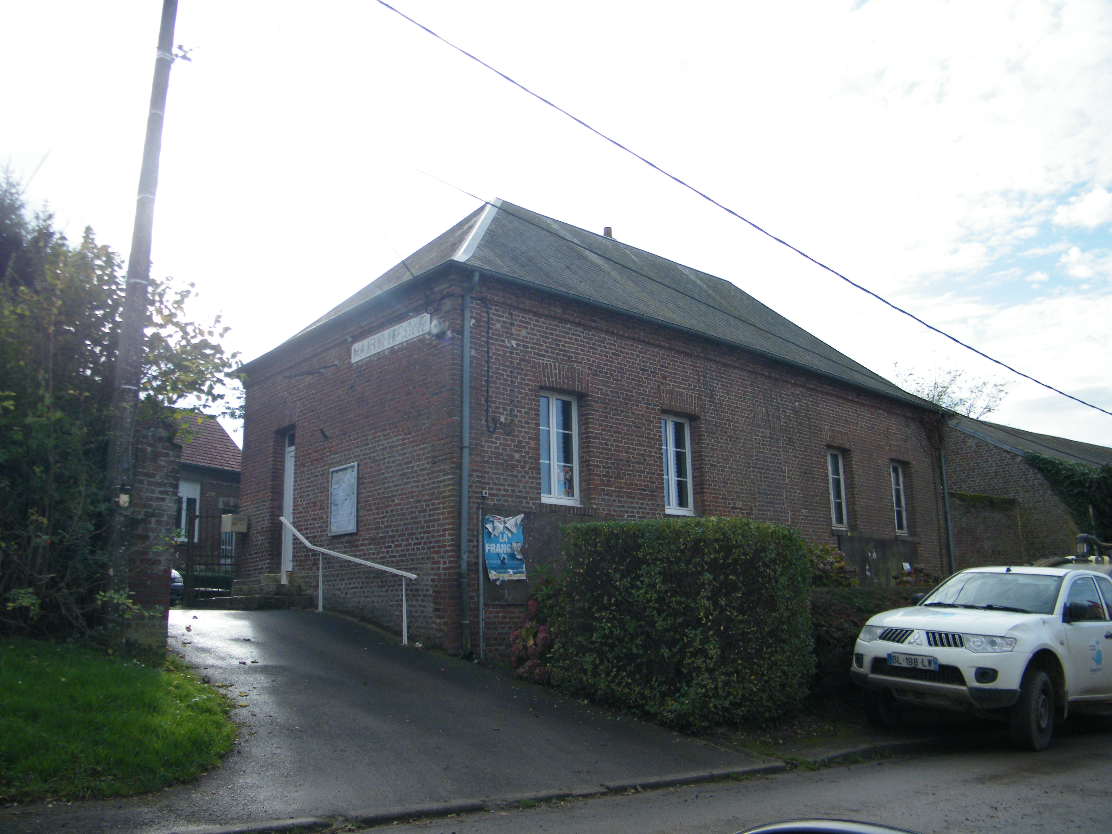 Bâtiments communaux.